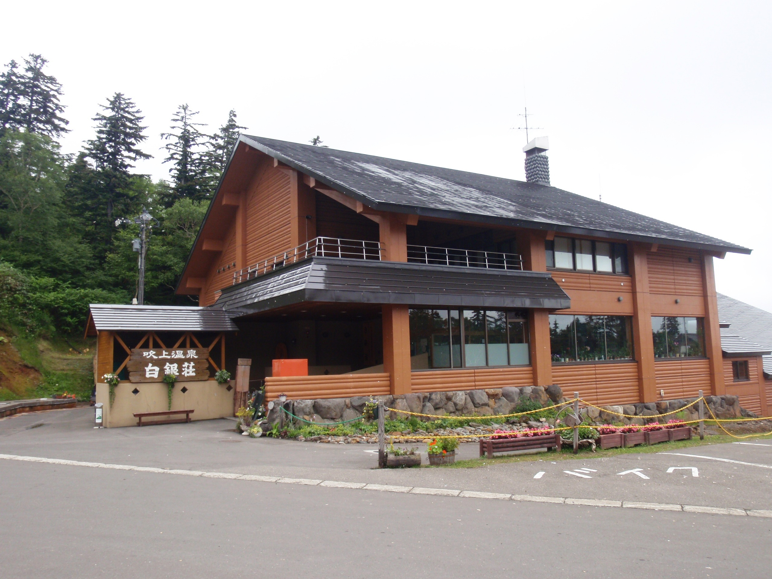 吹上温泉、白金荘